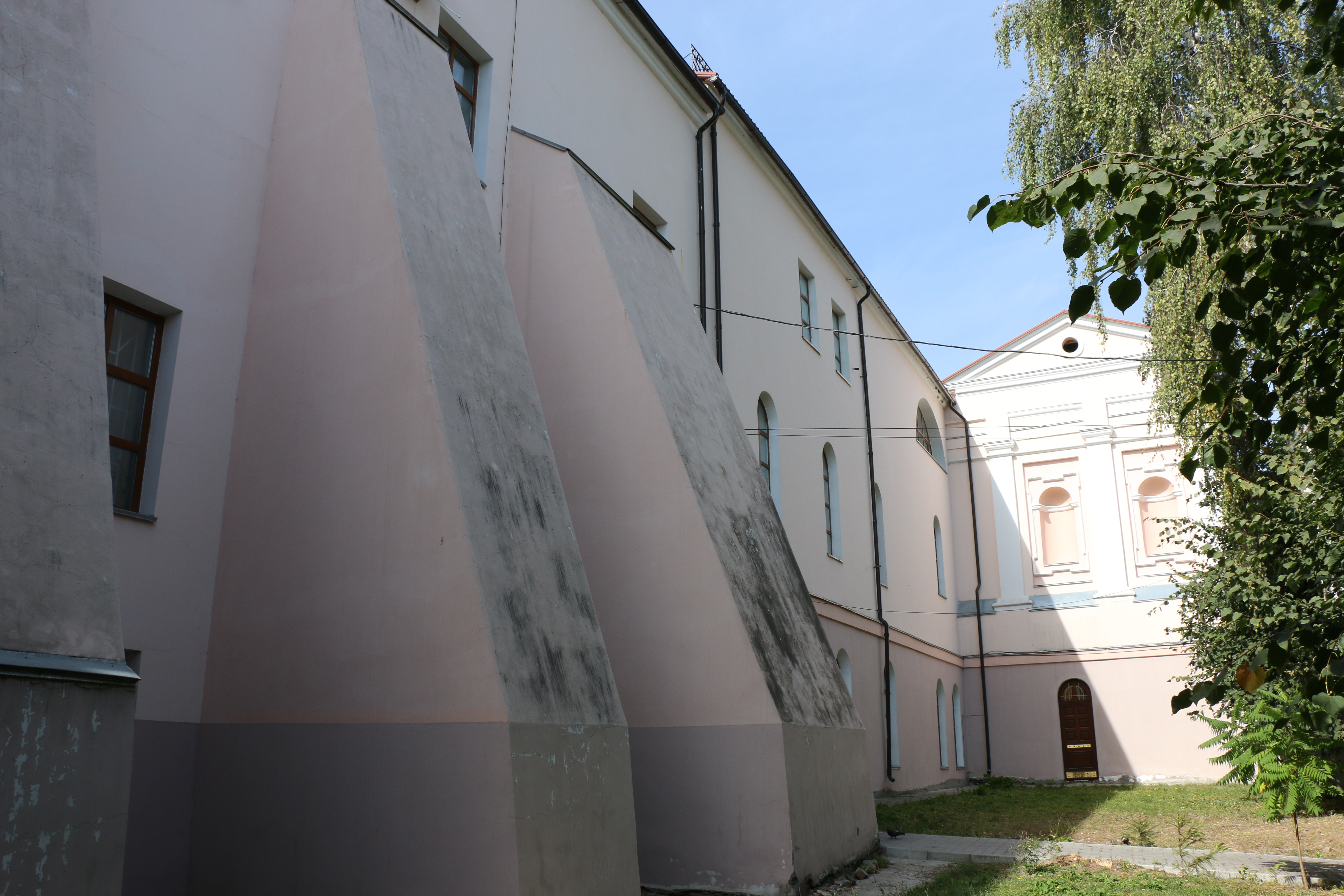 Єзуїтський монастир - Колегіум, Вінниця, вул. Соборна, 17